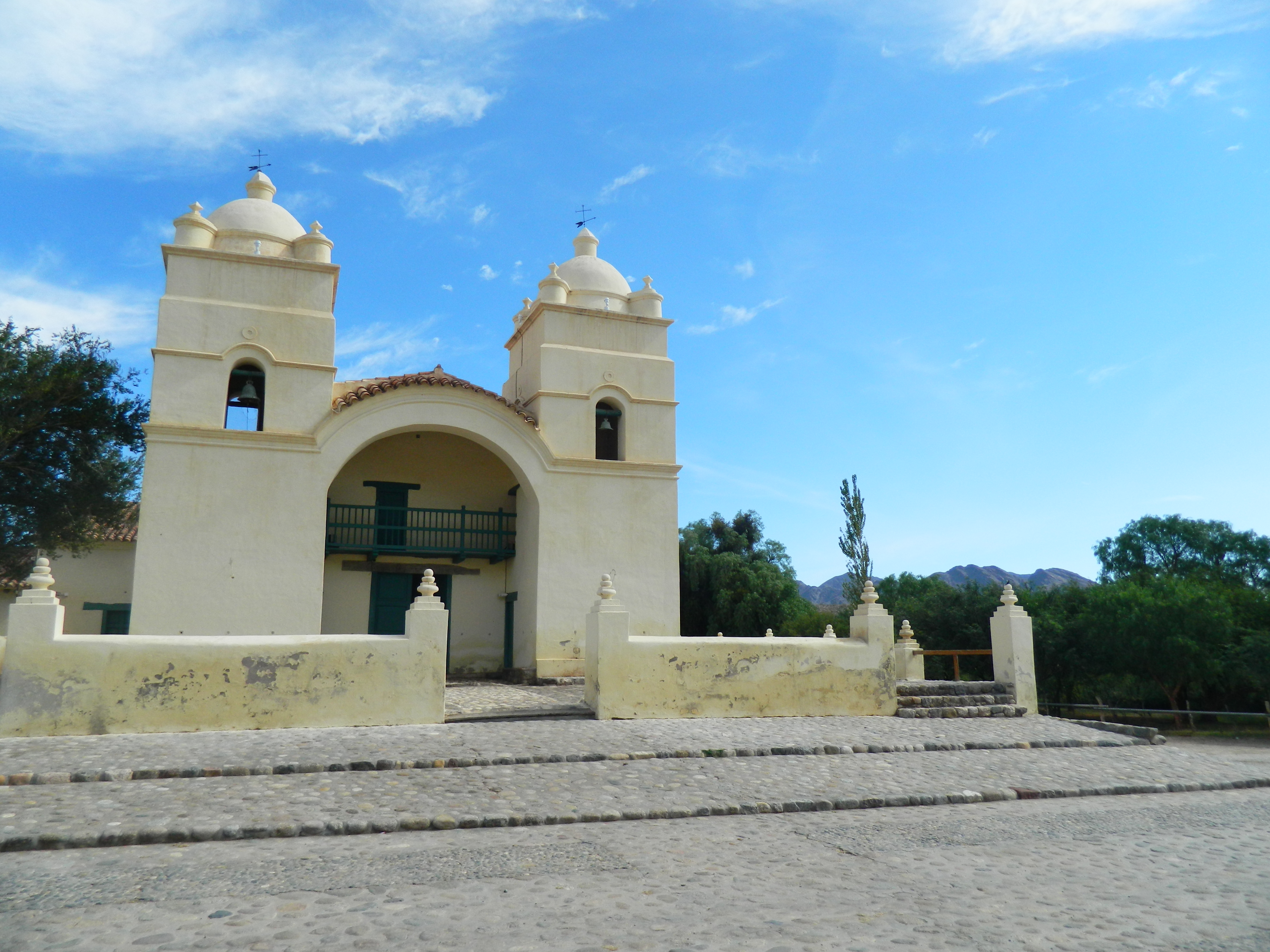 Fachada y atrio de la Iglesia de San Pedro de Nolasco, en el pueblo de Molinos, provincia de Salta, Argentina